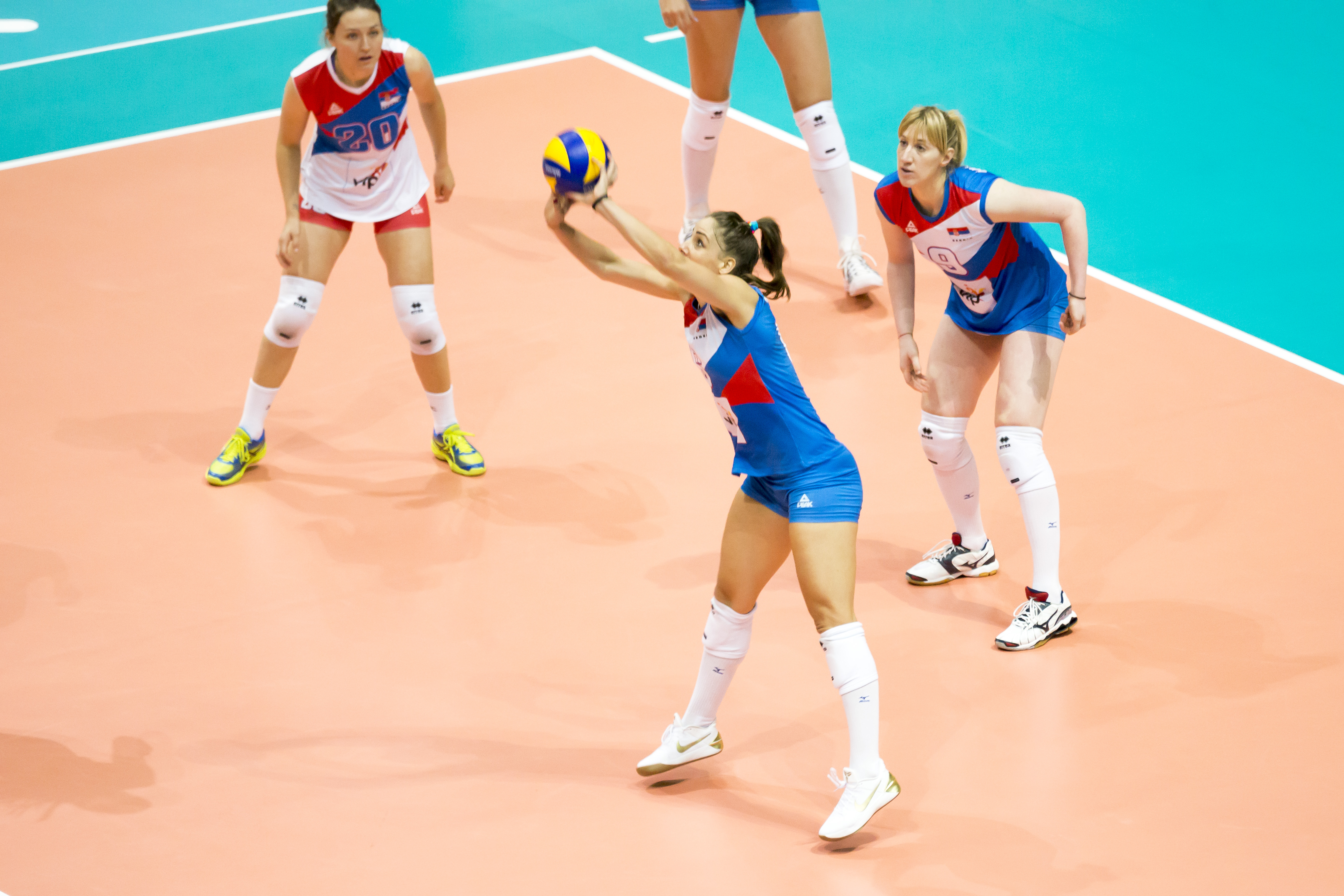 Serbia 9. BRANKICA MIHAJLOVIC